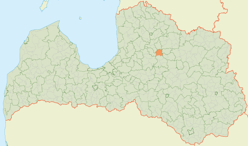 Dzērbenes pagasts